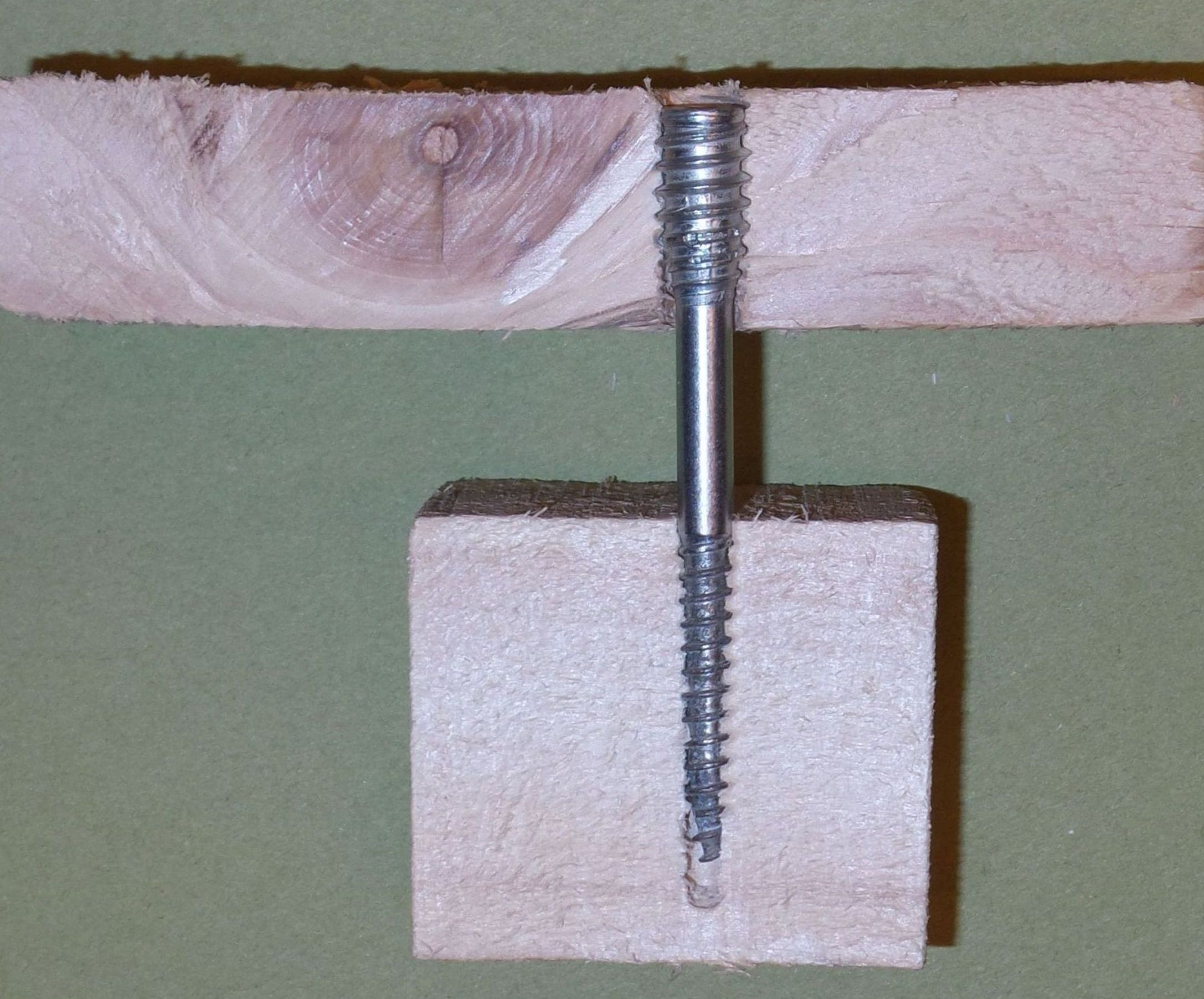 Distanzschrauben-Verbindung zwischen zwei Hölzern